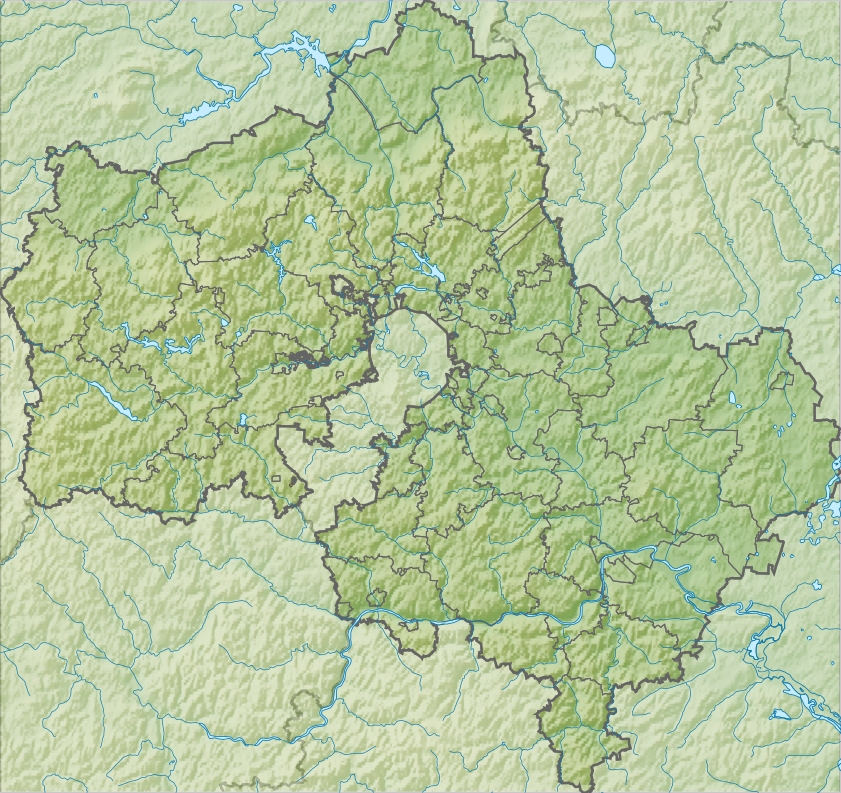 Физическая карта Московской области, Россия. Координаты для GMT: -R35.1435/40.2035/54.2557/56.9611 Инструменты: GMT, Inkscape